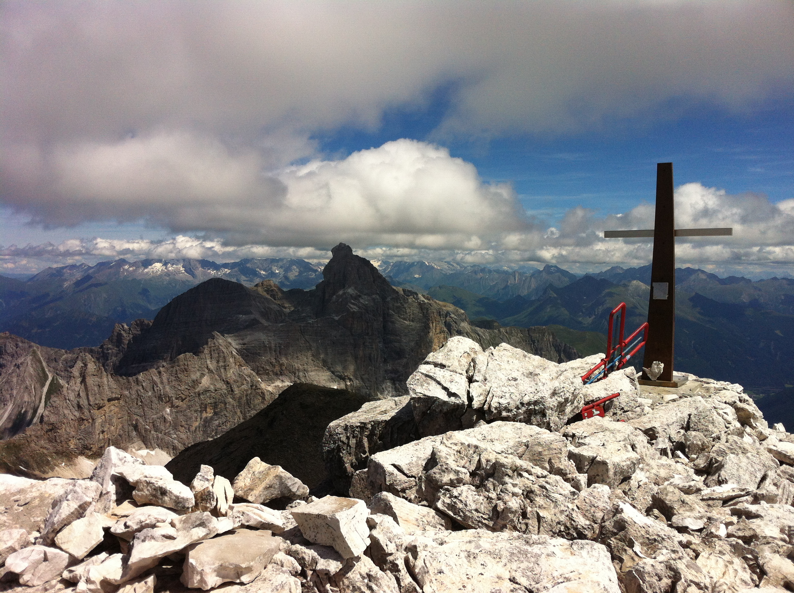 Neues Gipfelkreuz auf der Weißwandspitze von der Landesberufsschule „Chr. J. Tschuggmall“ (seit 2015)